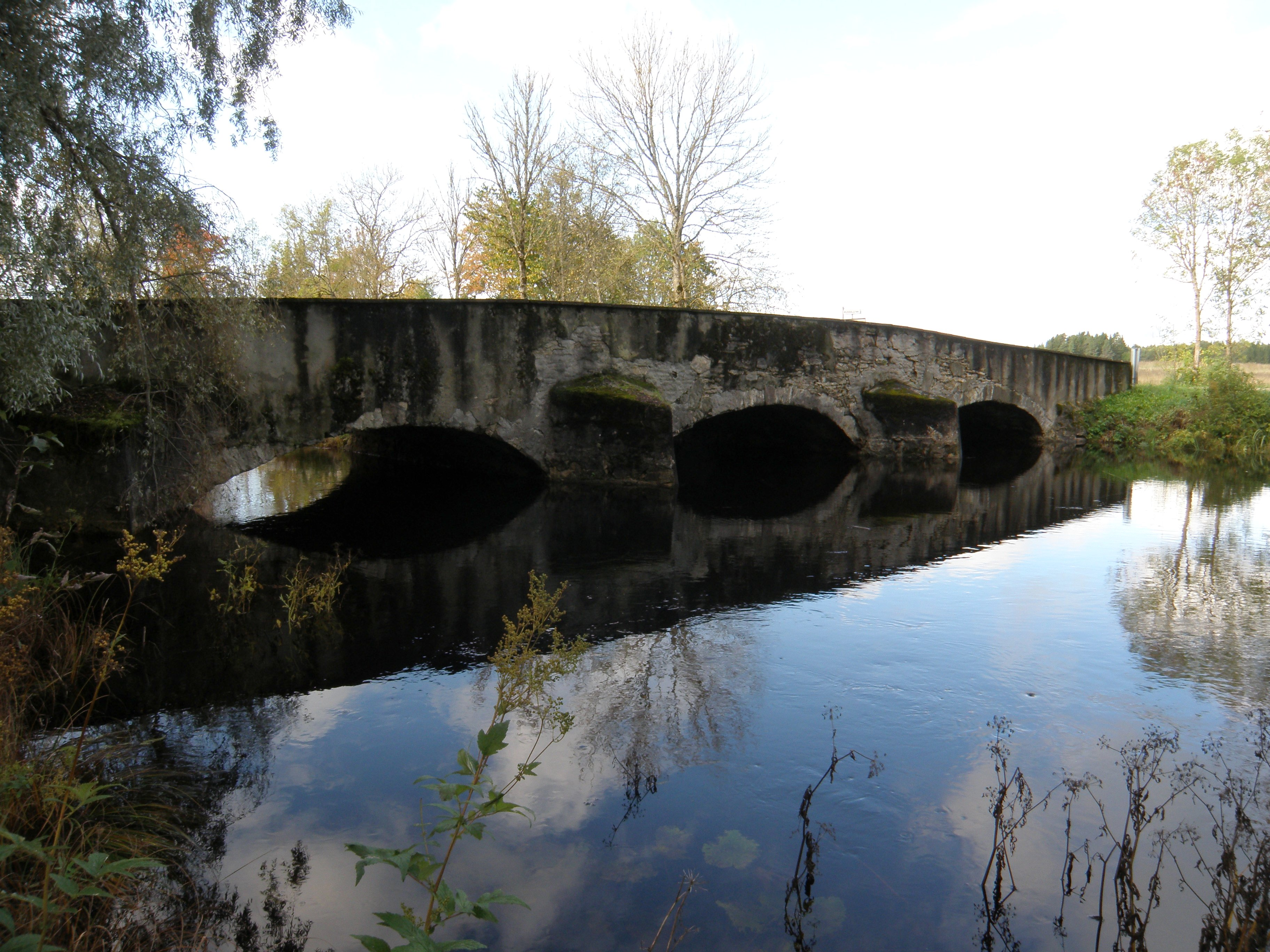 Russalu mõisa sild